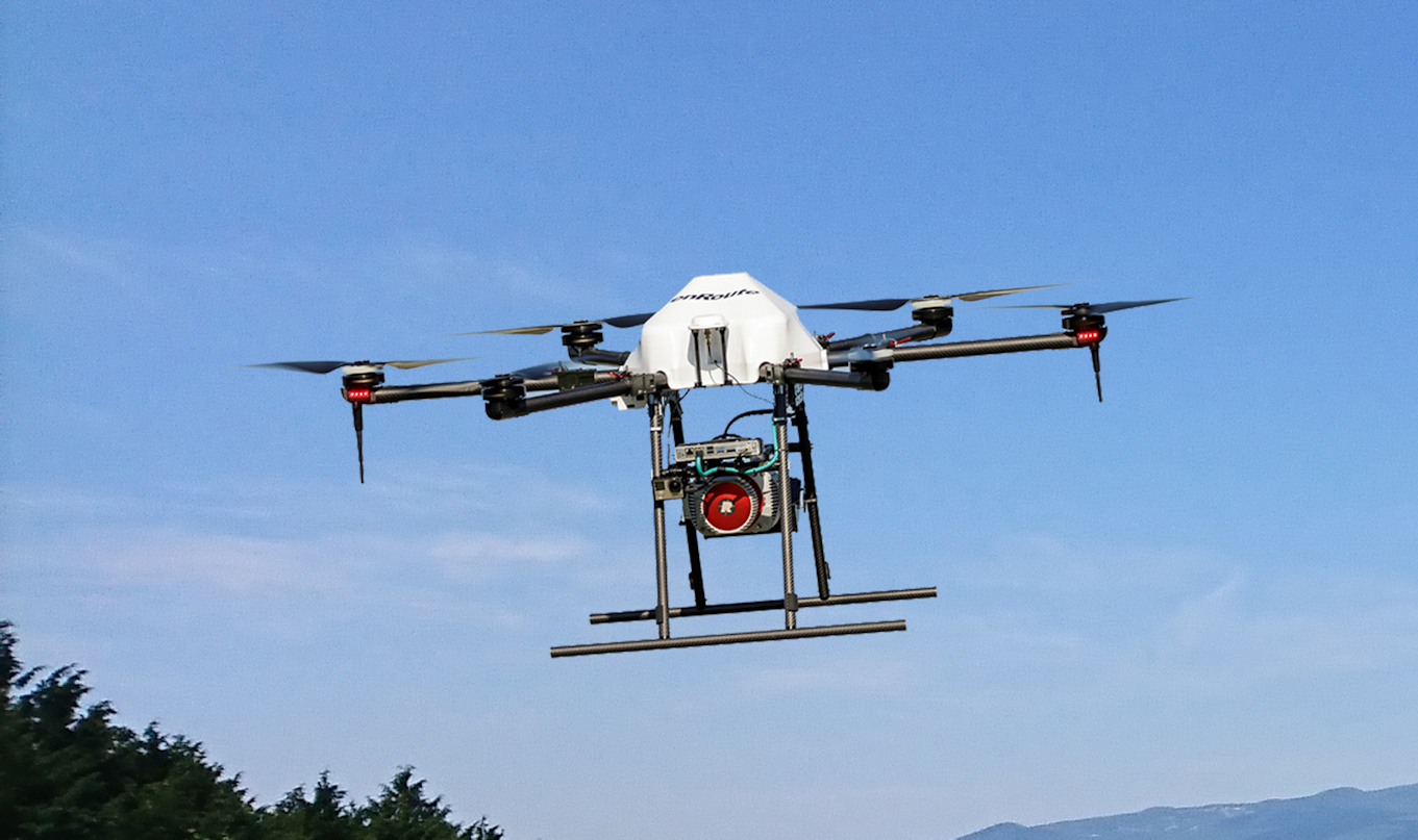 測量機器としての使用例。UAV搭載型レーザスキャナを用いている。